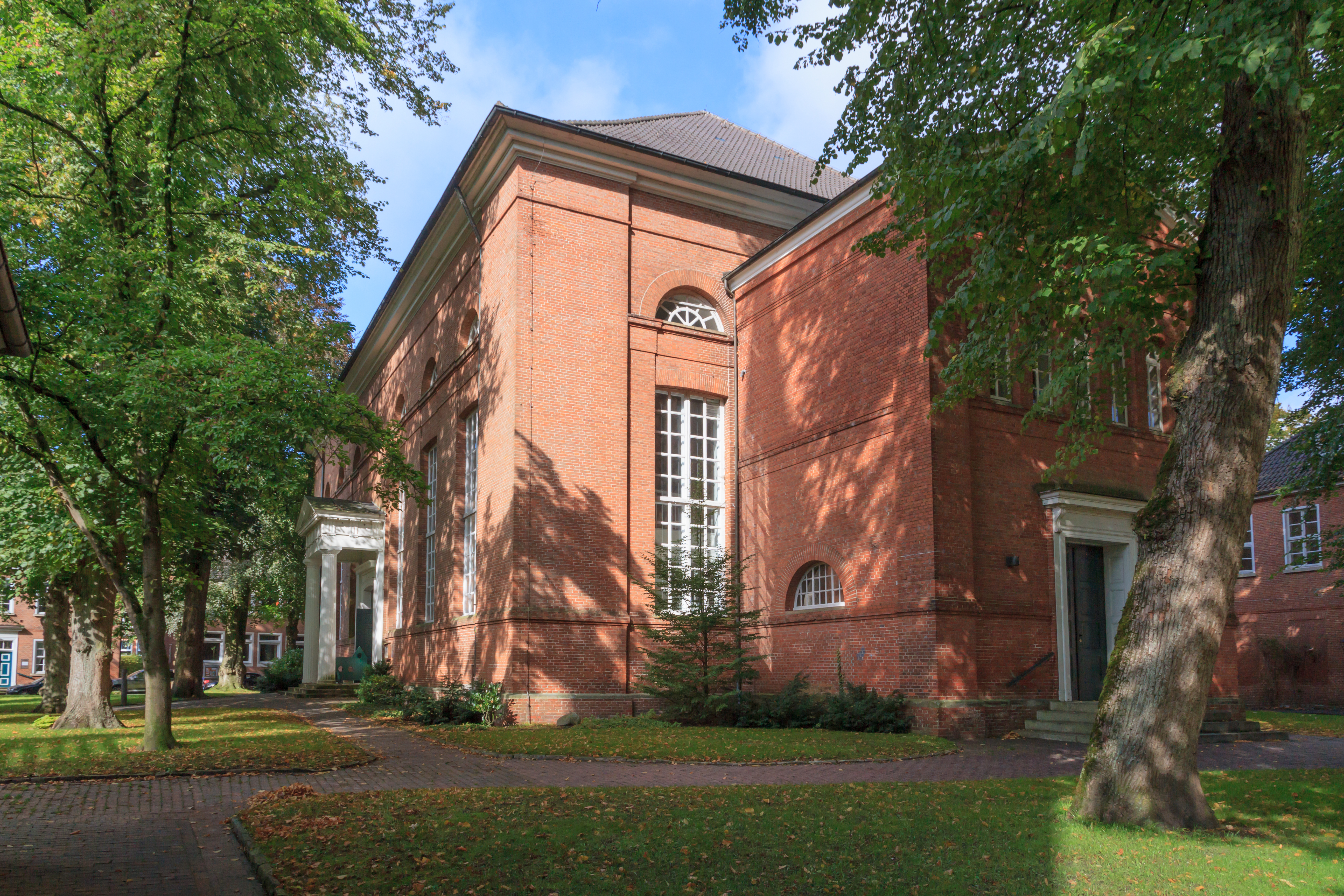 Lambertikirche